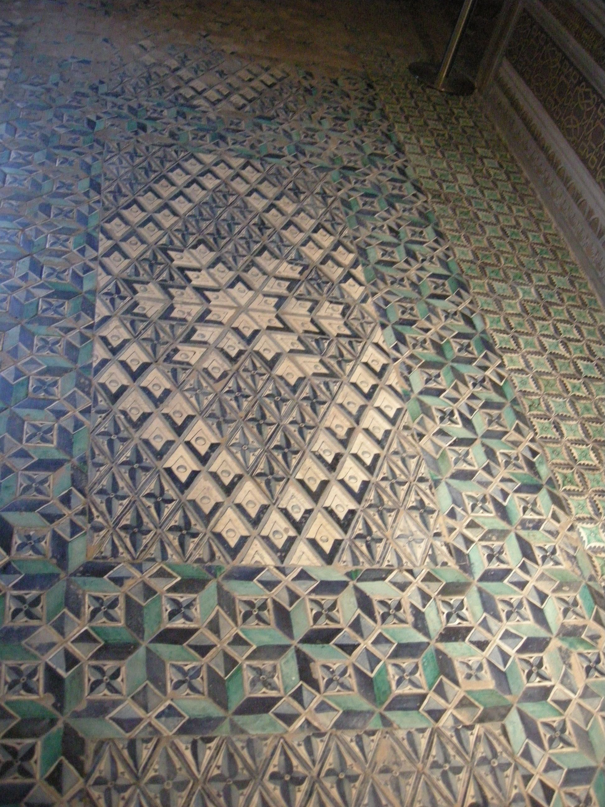 Appartamento borgia